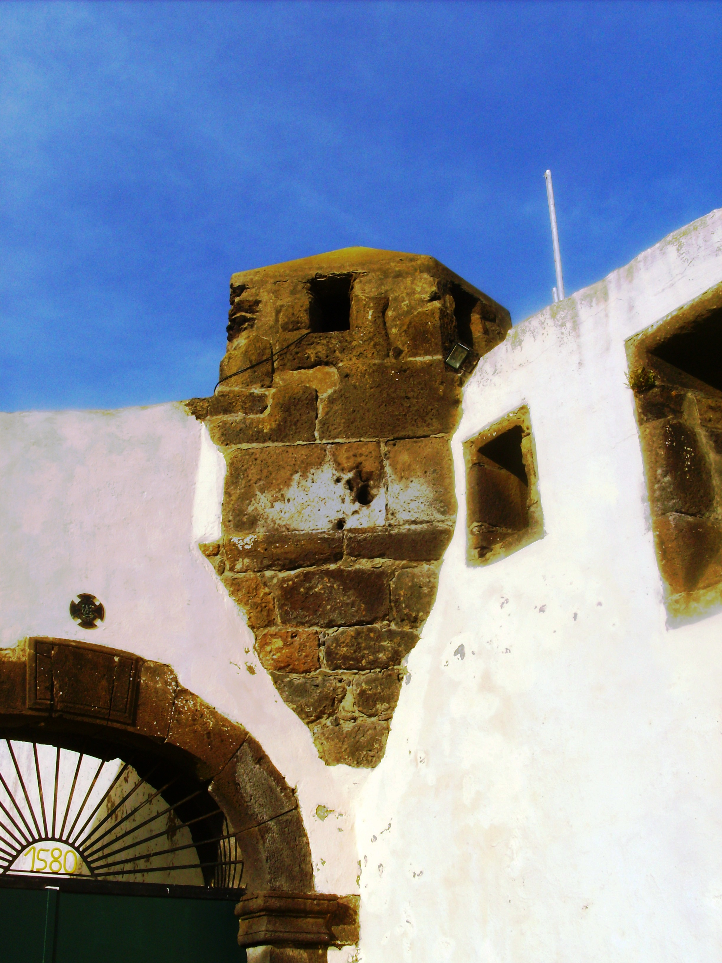 Forte de Santa Catarina (Cabo da Praia), Praia da Vitória, Ilha Terceira, Açores.